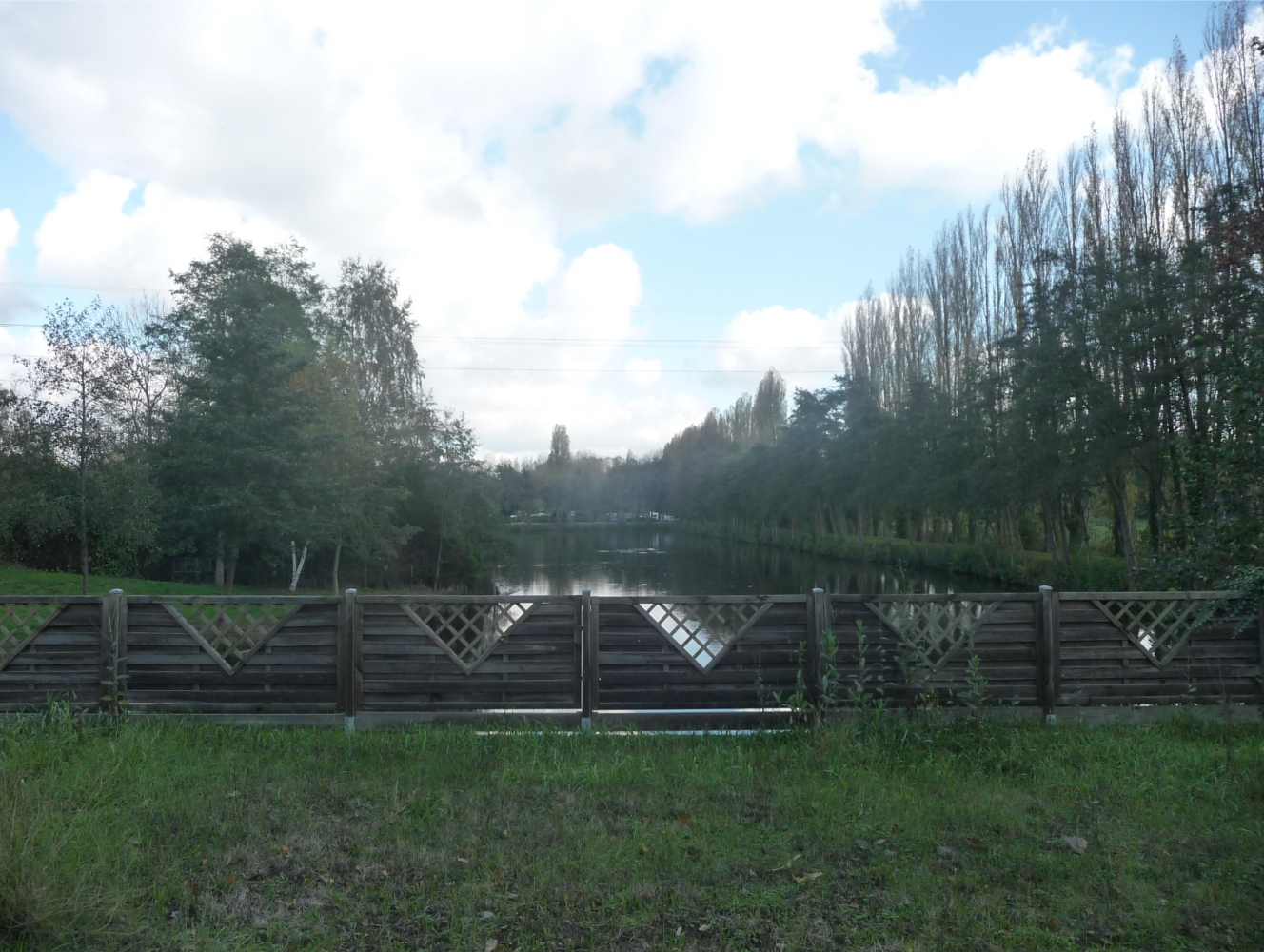 étang entre l'orge et la remarde à Ollainville